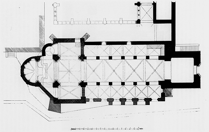 Grundriss der Propsteikirche Oberpleis vor der Restaurierung 1892–94